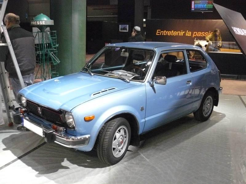 Retromobile 2012